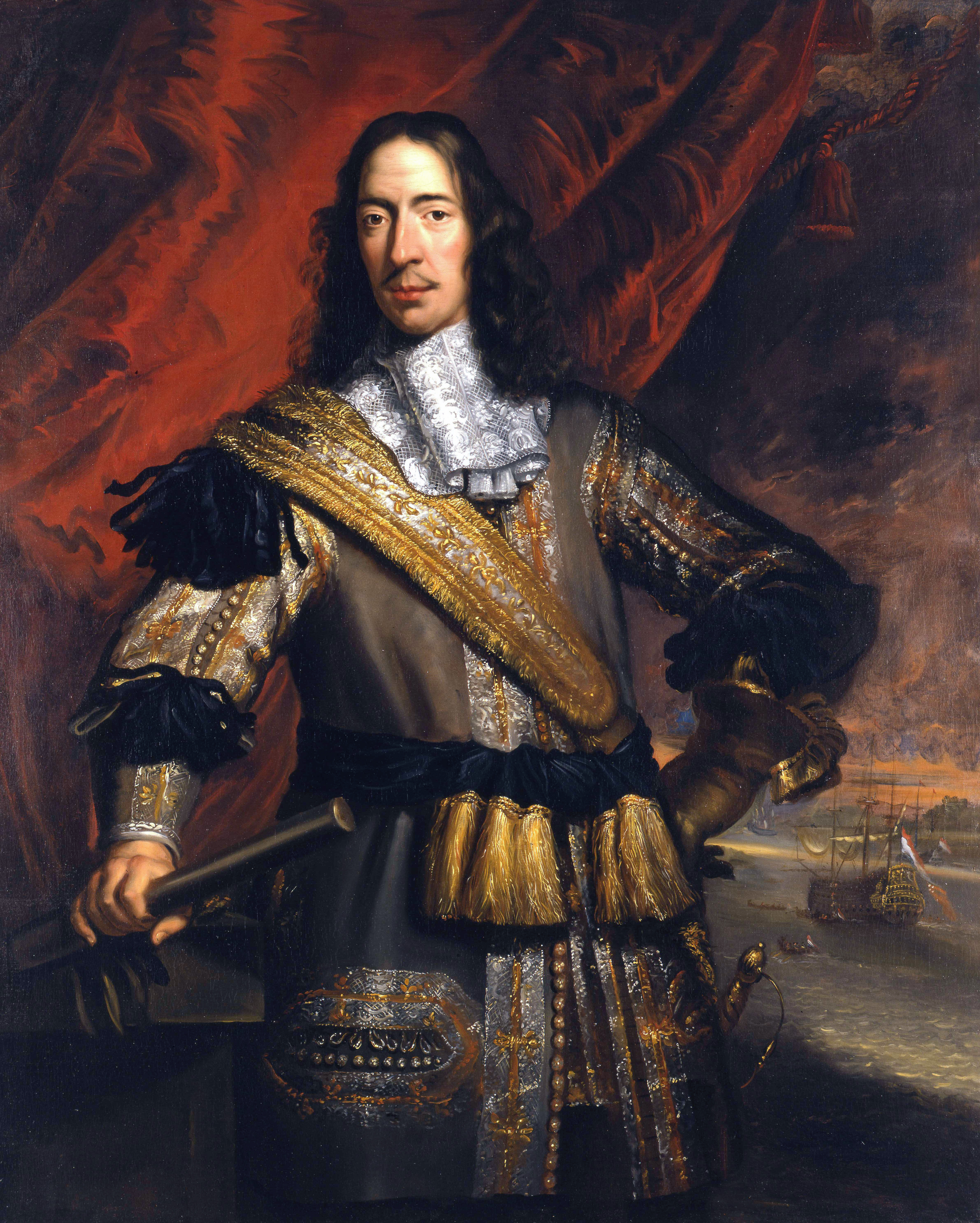 Cornelis de Witt (1623-1672), burgemeester van Dordrecht, ruwaard van Putten; op de achtergrond de Tocht naar Chatham